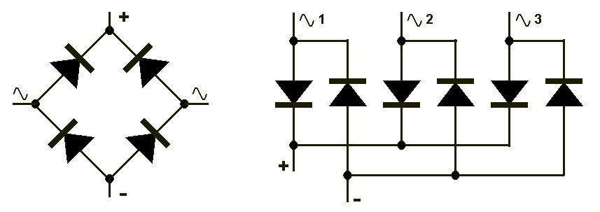 Door de auteur zelf vervaardigde afbeelding.